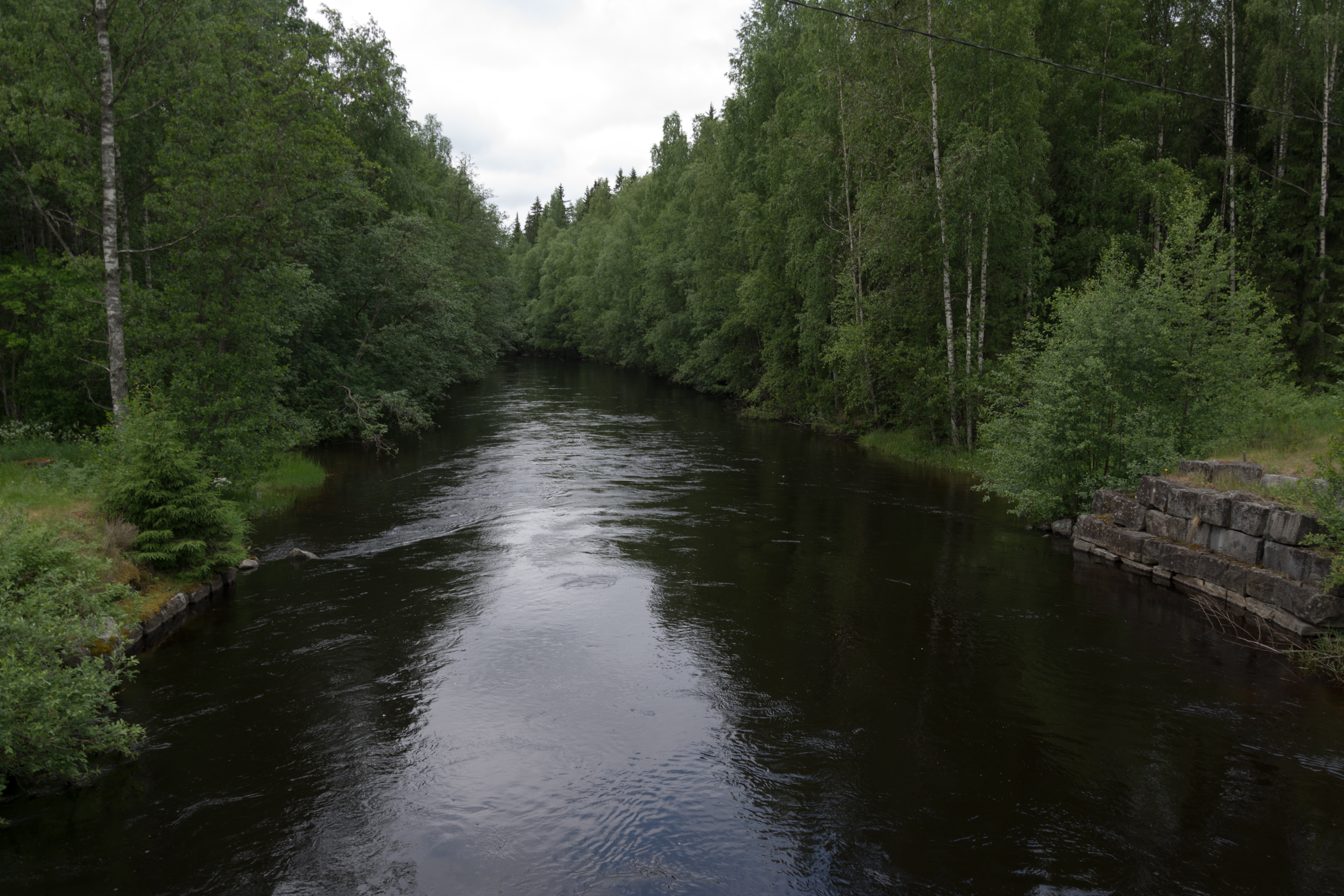 Läsäkosken kanava Kangasniemellä